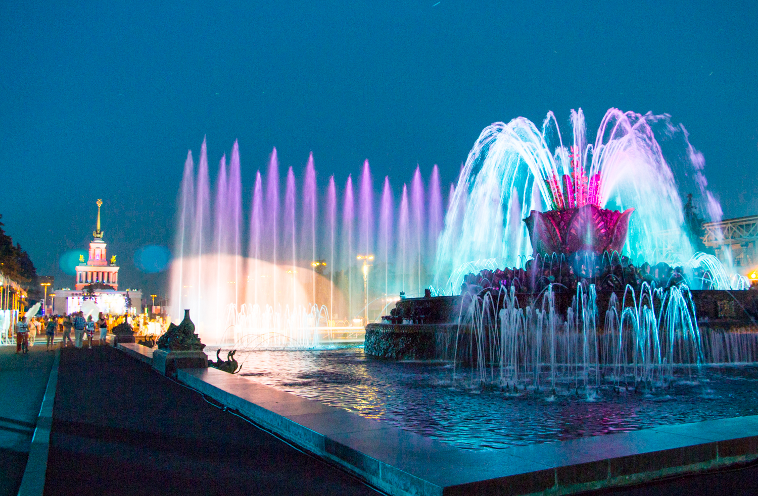 Выставка достижений народного хозяйства (Москва и Московская область, Москва, Мира проспект, 115)